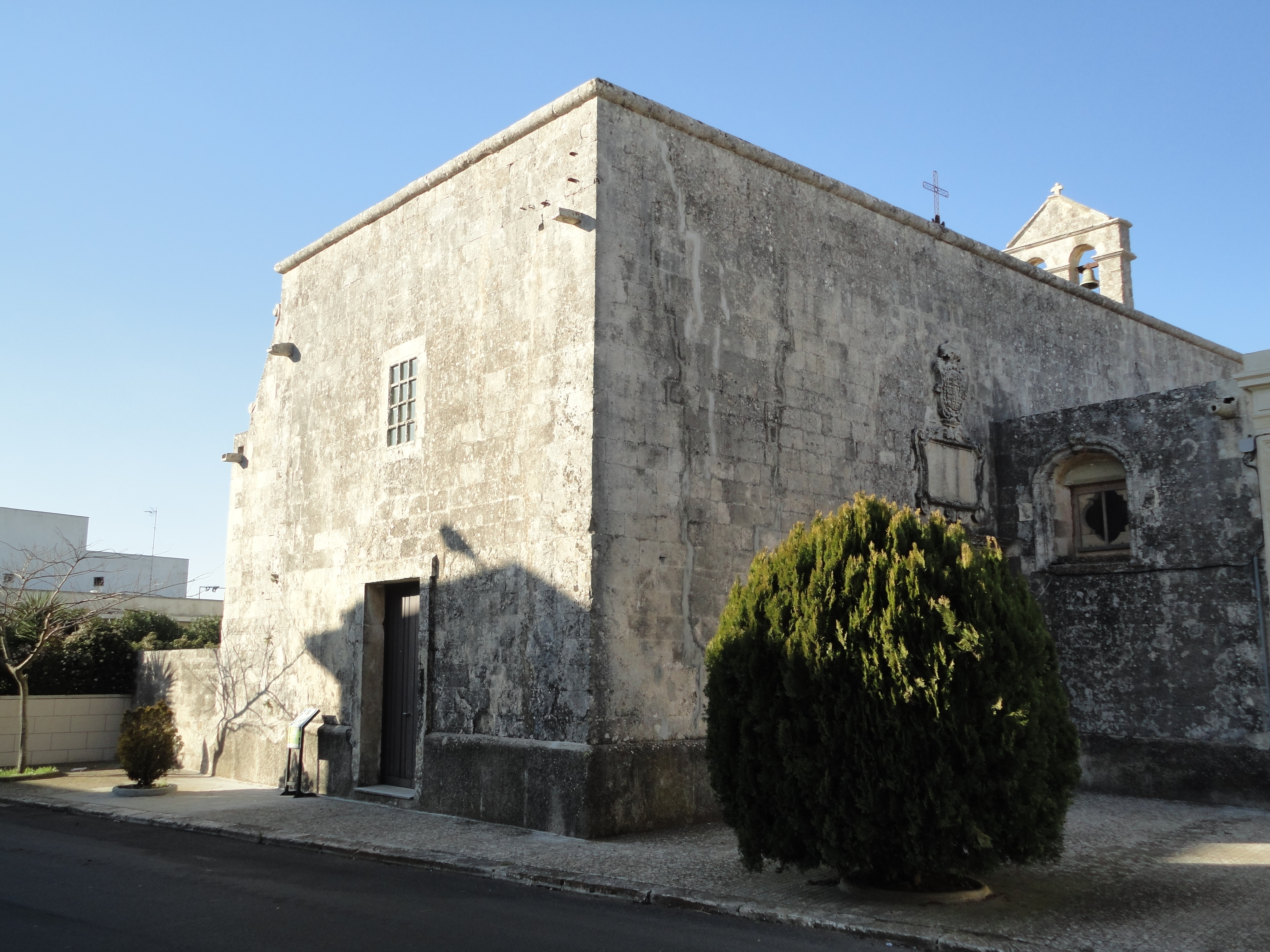 Cappella Madonna dei Poveri Giuggianello, Lecce